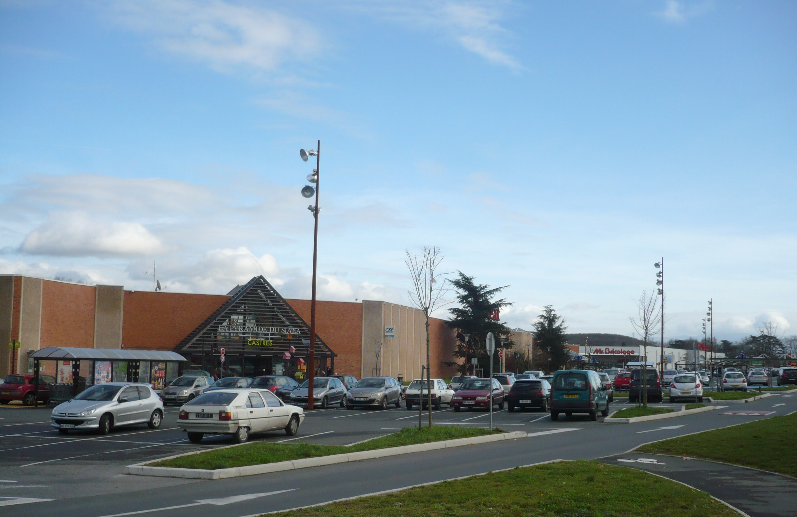 Zone commerciale du Siala à Castres (Tarn, France).